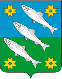 Герб посёлка Муезерский, Карелия